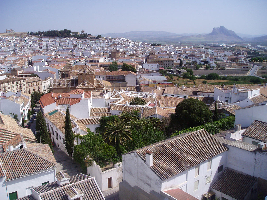 Antequera, Andalucía, España